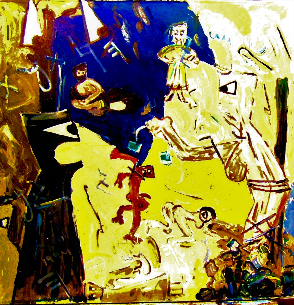 תמר אשת ער. ציור של אמנון בקר